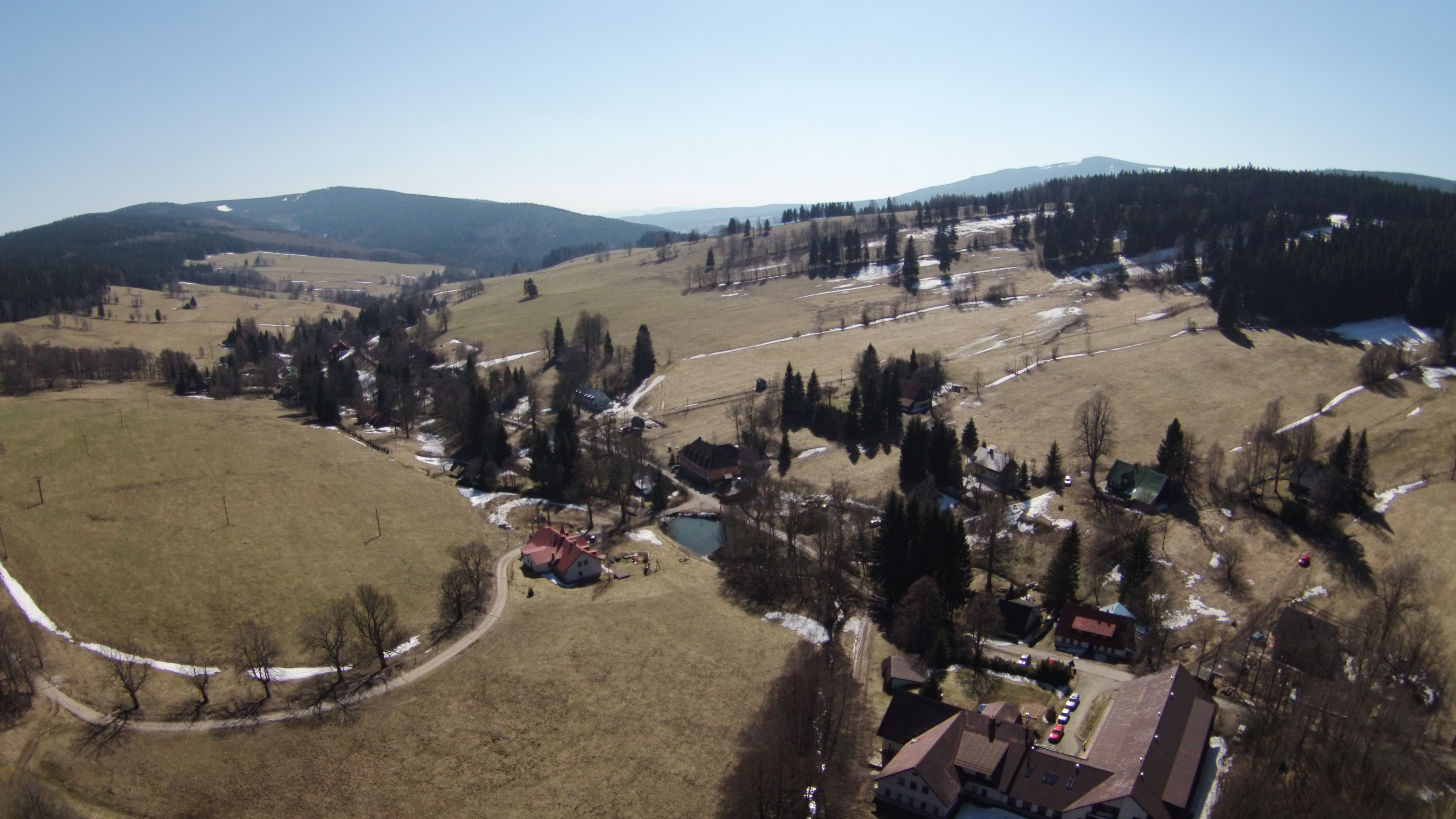 Horní Albeřice.